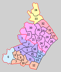 千葉県山武郡の町村。